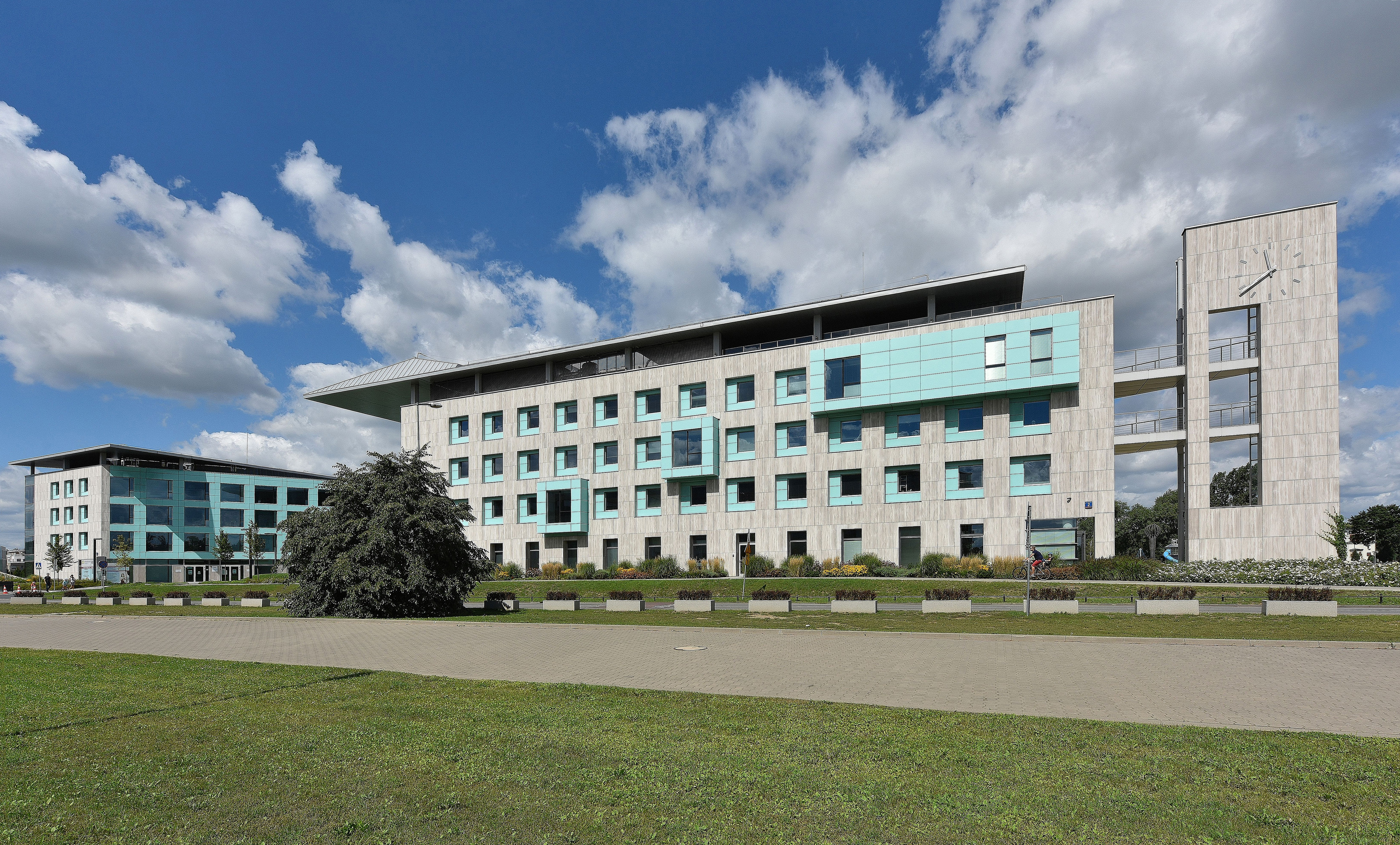 Ratusz dzielnicy Wilanów w Warszawie